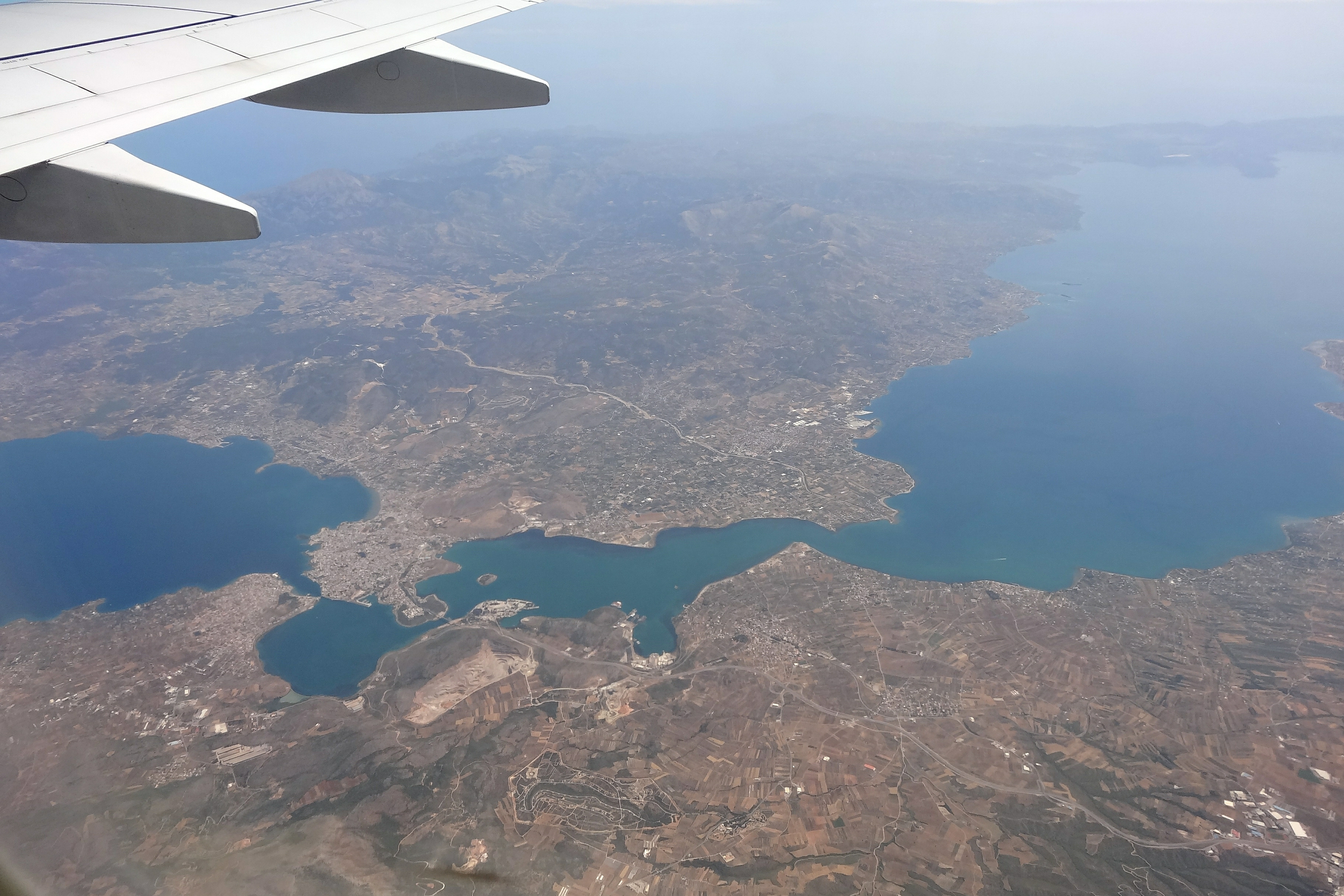 CHALCIS FLIGHT ATH-ARN 737 SAS LN-RGA